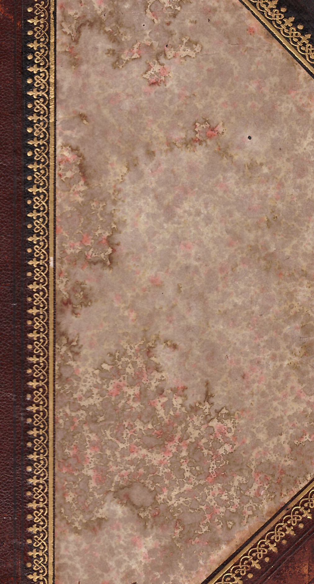 Rudnyánszky Gyula (1858-1913): Fényben árnyban (1886) - külső borító